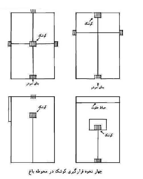 نحوه قرارگیری کوشک در باغ